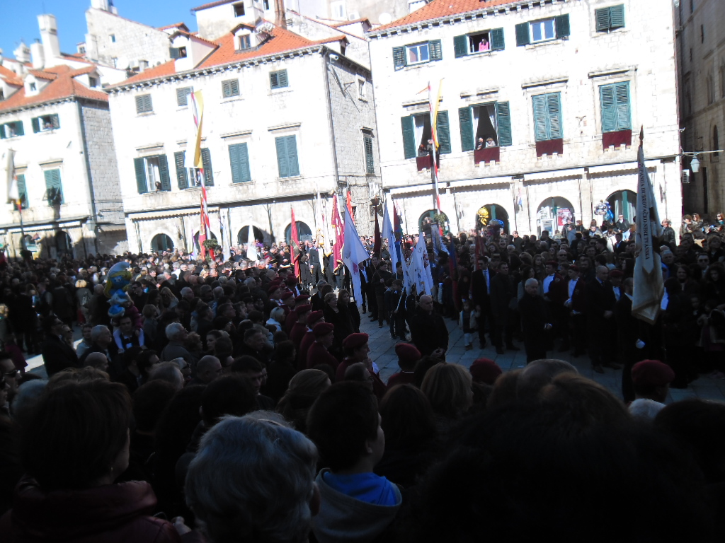 Festa svetog Vlaha i Dan Grada 2014.